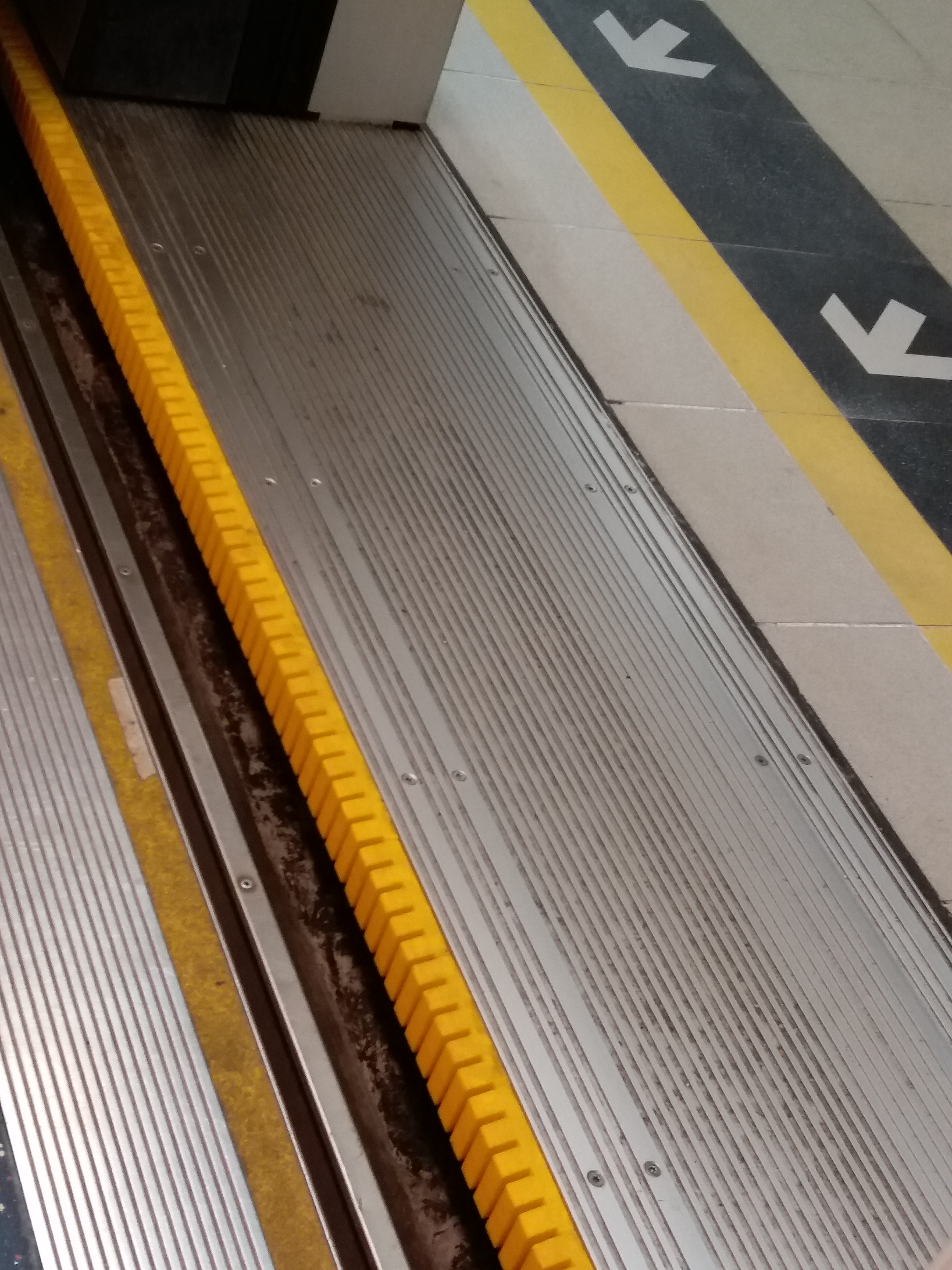 中文（香港）: 這款月台閘門下方設有軌道，讓開關時更有效率